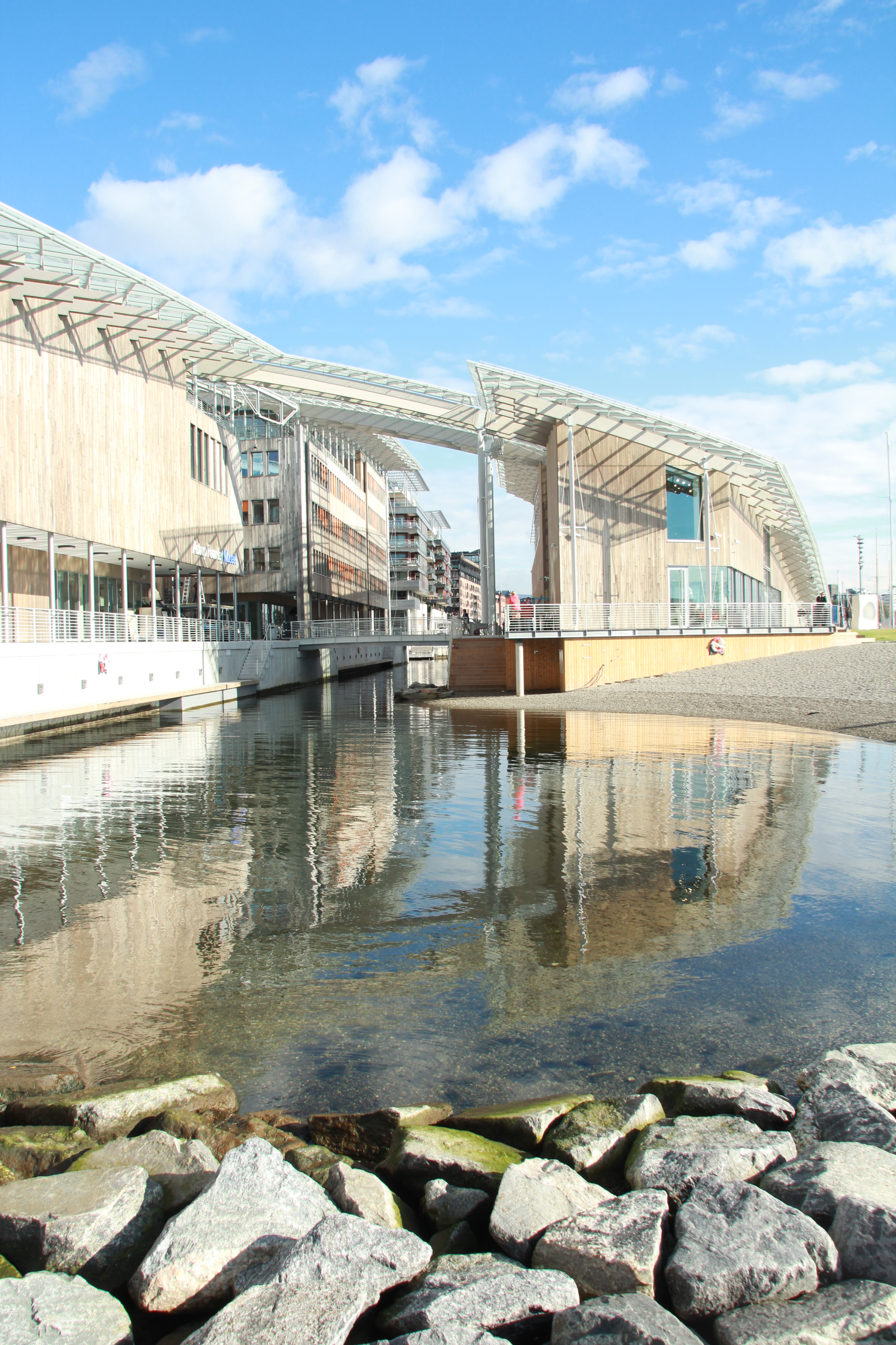 Astrup Fearnley Museet for Moderne Kunst, Oslo. Oppført 2012. Arkitekt Renzo Piano.